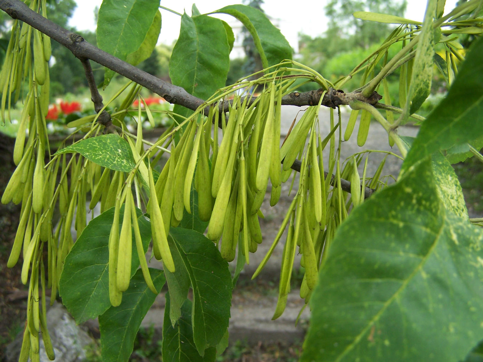 Fraxinus pennsylvanica (pl. jesion pensylwański)